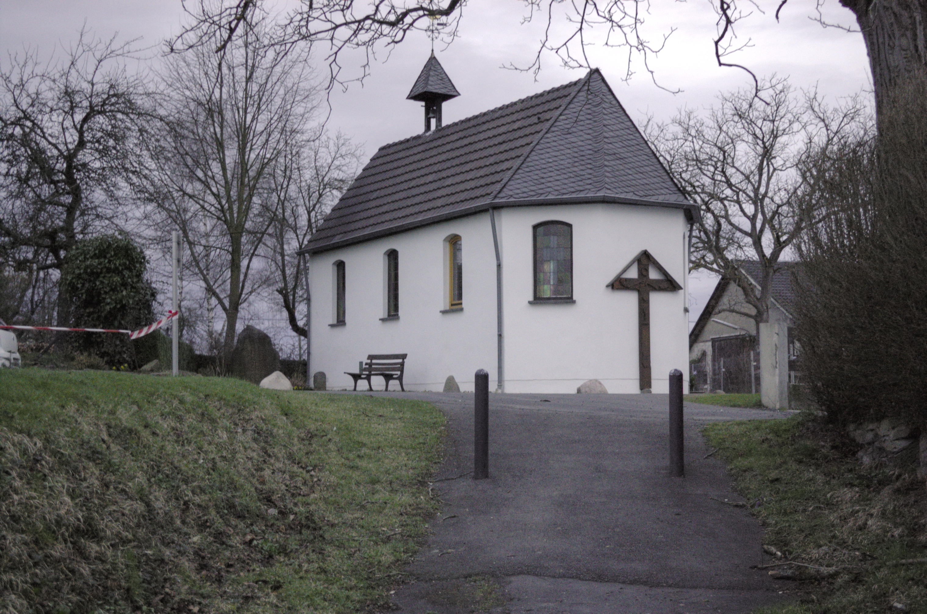 Kapelle Sankt Agatha, Agathastraße 23, Adscheid, Stadt Hennef (Sieg)